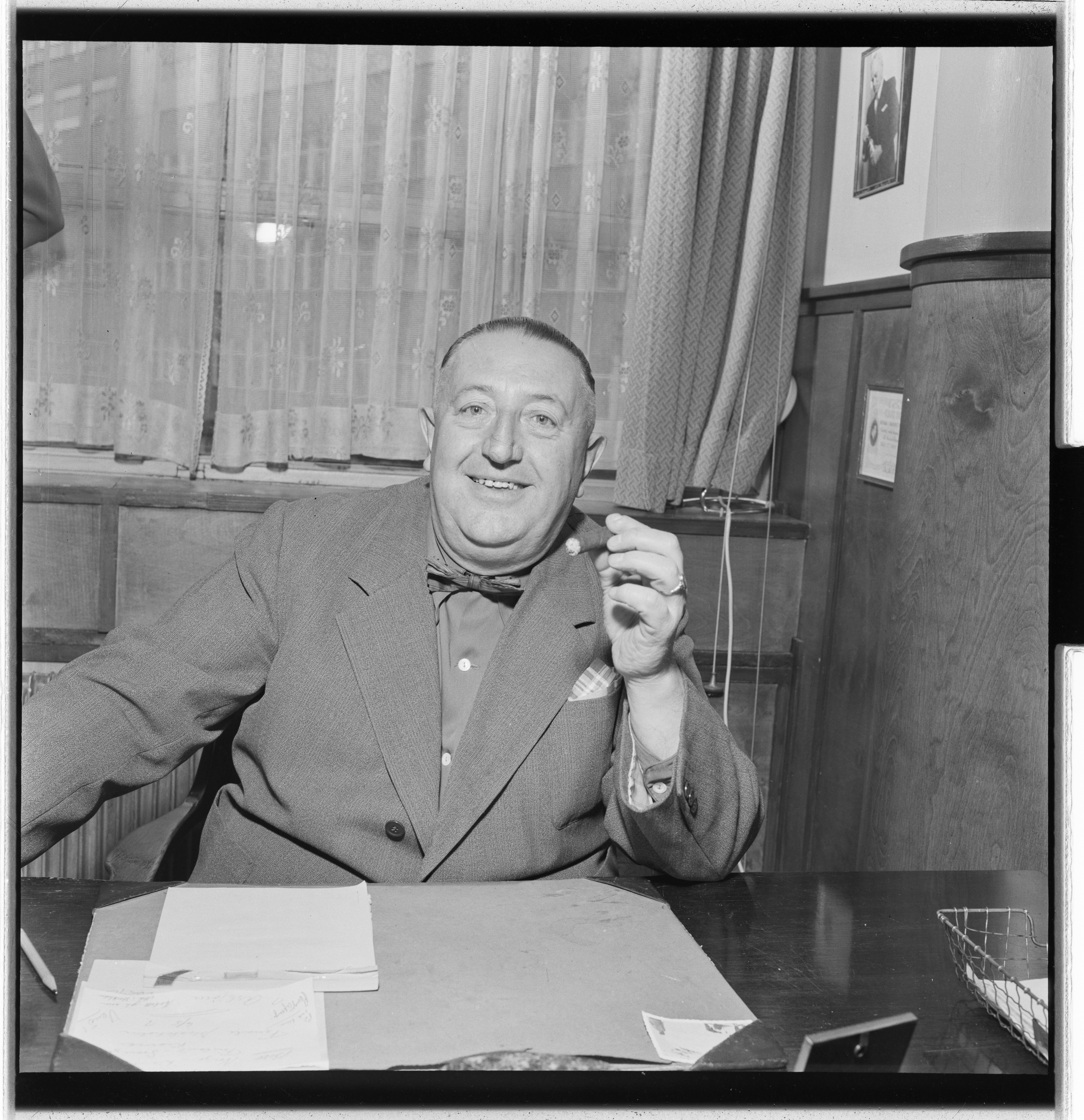 Bildet er hentet fra Arkivverket. Einar Rose Arkivinstitusjon : Riksarkivet Arkivnavn : Billedbladet NÅ Sted : Norge, Oslo, Oslo, Ukjent Emneord: Menn, Portretter, Skuespillere, Komikere Avbildet: Rose, Einar